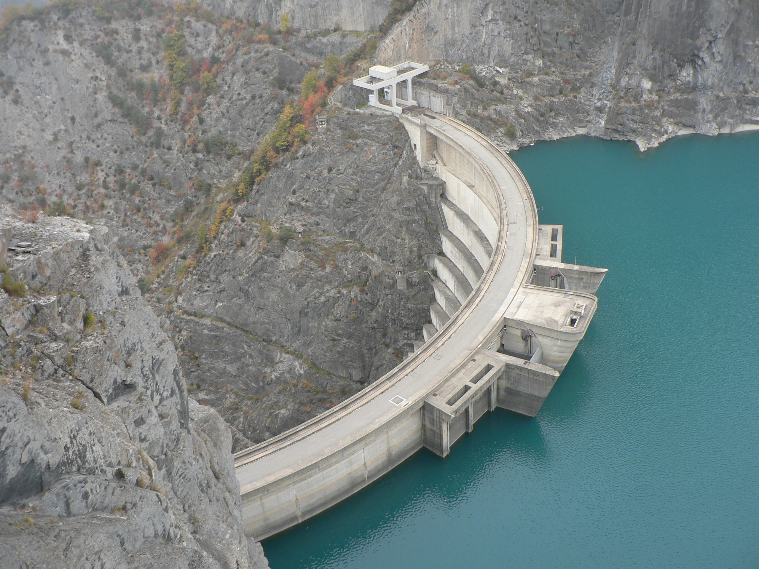 Barrage de Monteynard (Isère, France)